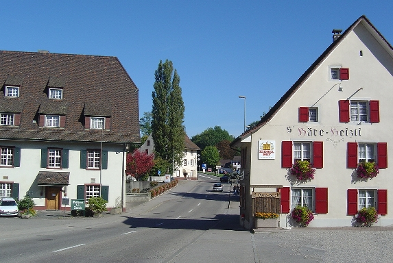 Augst BL, Schweiz - Hauptstrasse, Ergolzbrücke und ehemaliger Zoll zwischen dem schweizerischen Baselaugst und dem habsburgischen Kaiseraugst